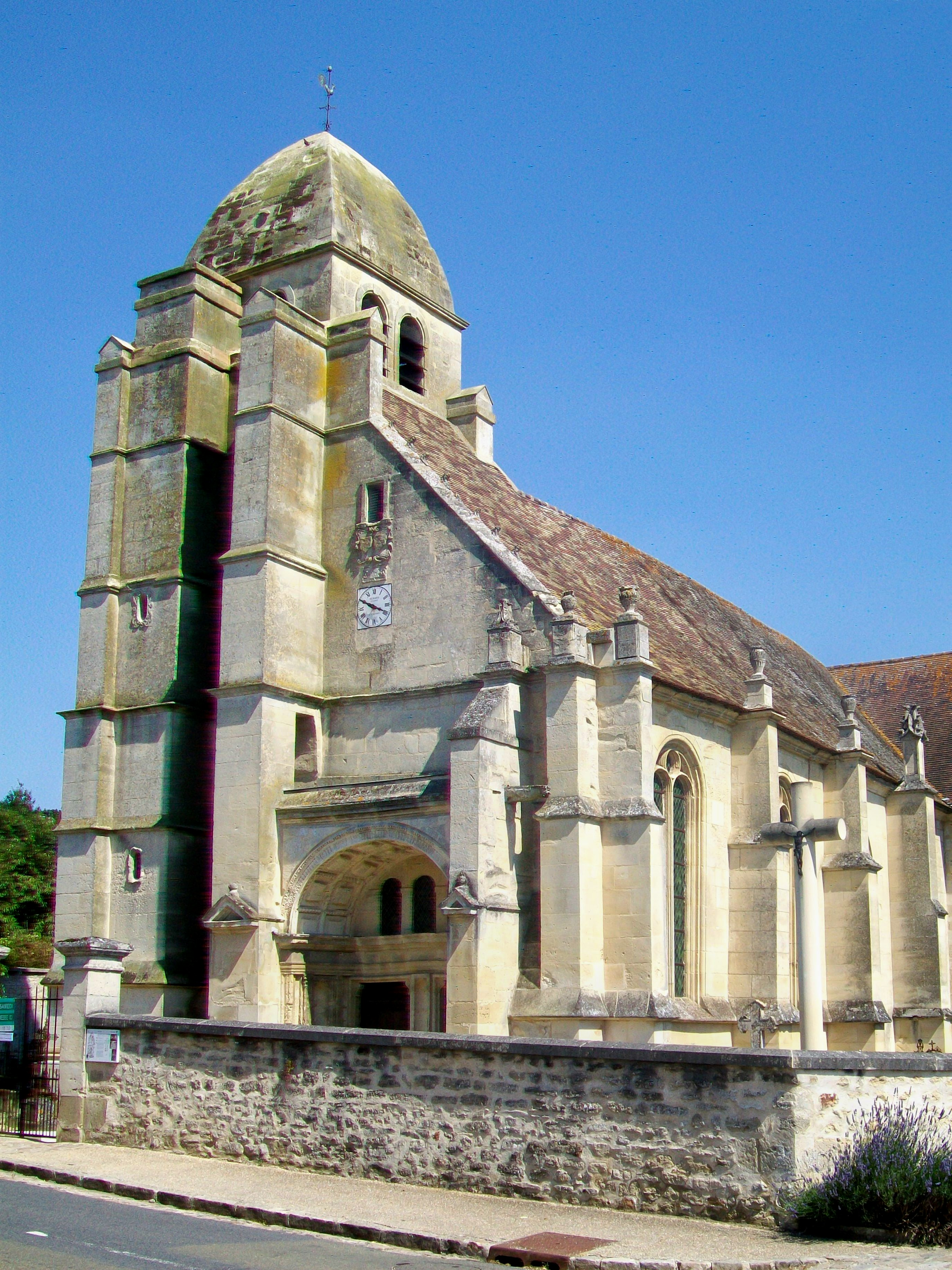 Façade nord-ouest et clocher.